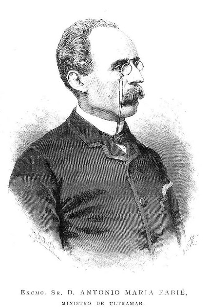 Retrato de Antonio María Fabié, recogido en la revista española La Ilustración Española y Americana.